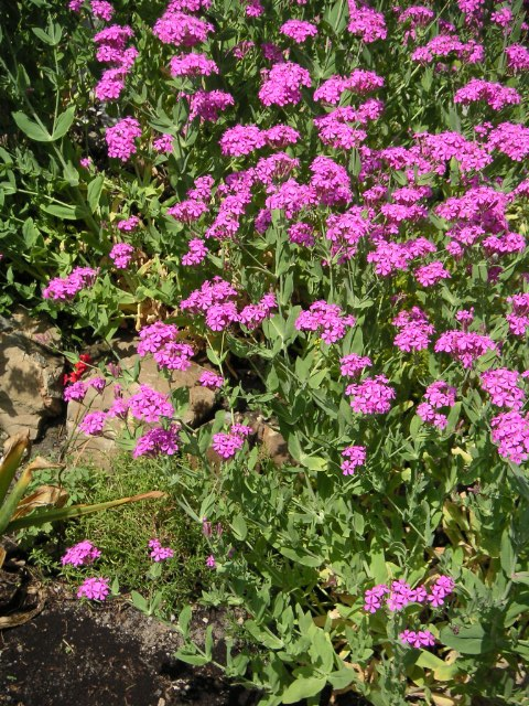 Description: Silene armeria, juillet 2004, cultivé Source: Jean-Jacques MILAN Licence: GFDL Jean-Jacques MILAN